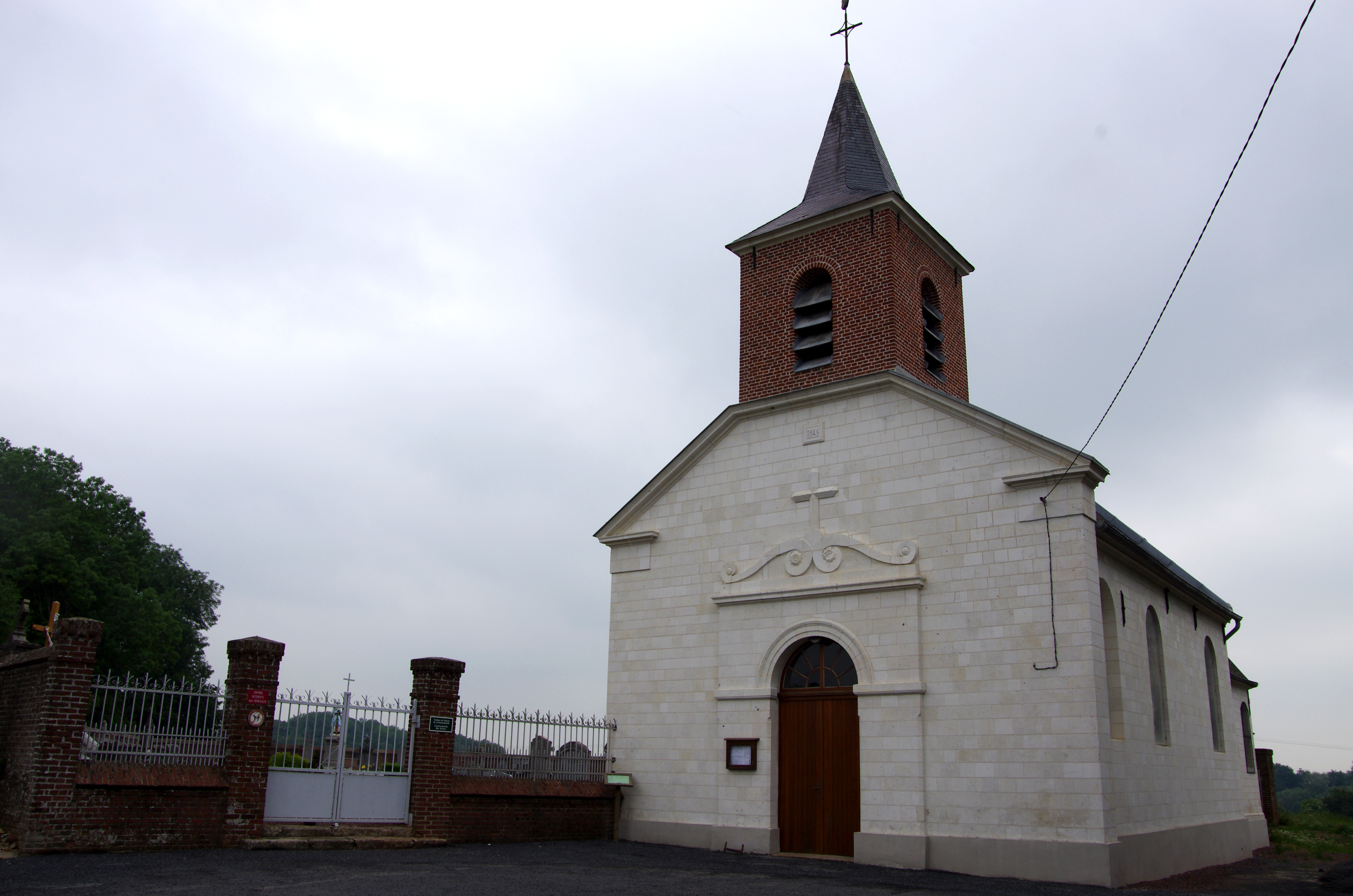 Bailleulval (Pas-de-Calais, France) - L'église, vue sous la pluie. .